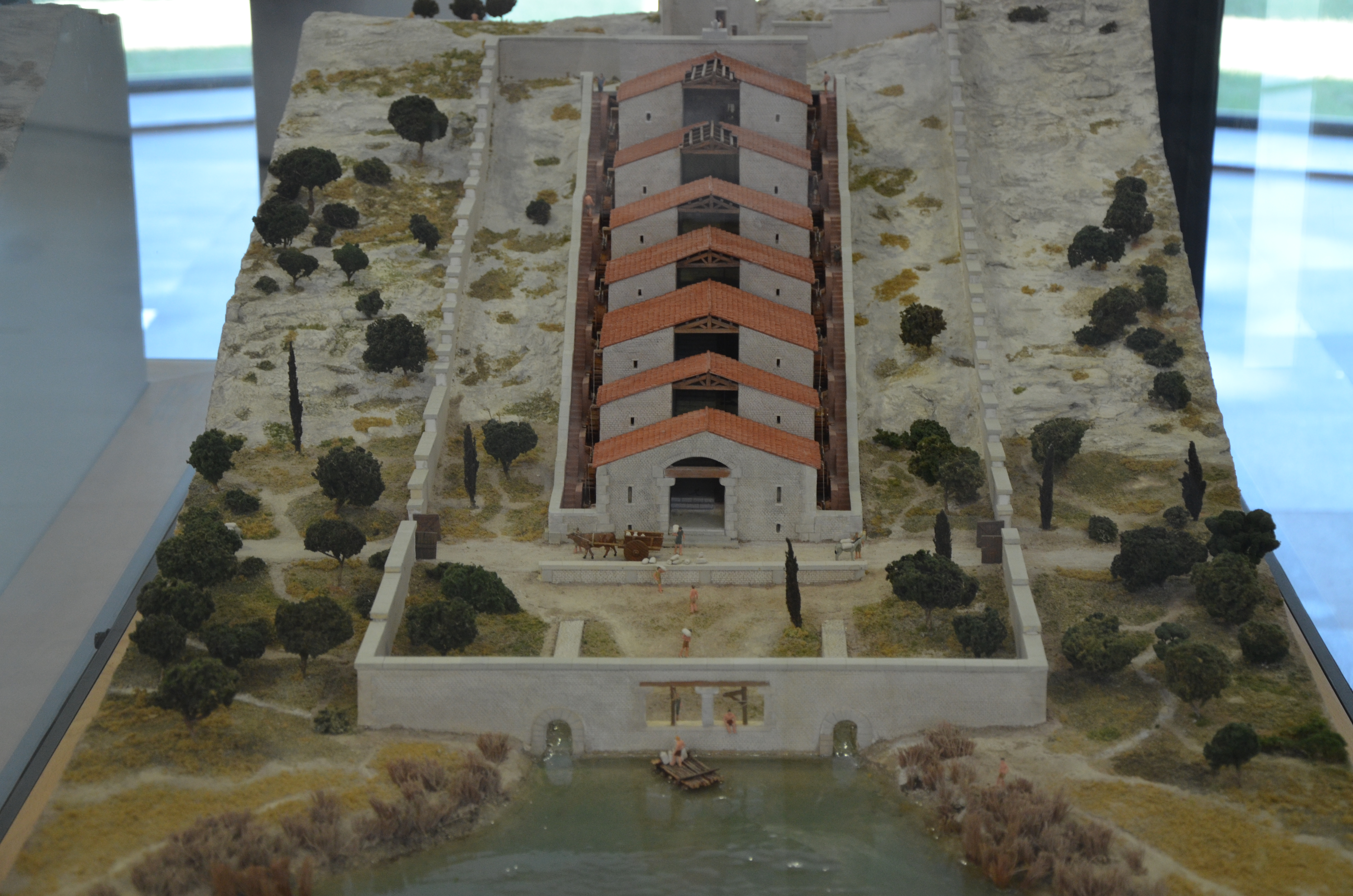 Musée de l'Arles antique, Arles, France: Modell der Wassermühlen von Barbegal